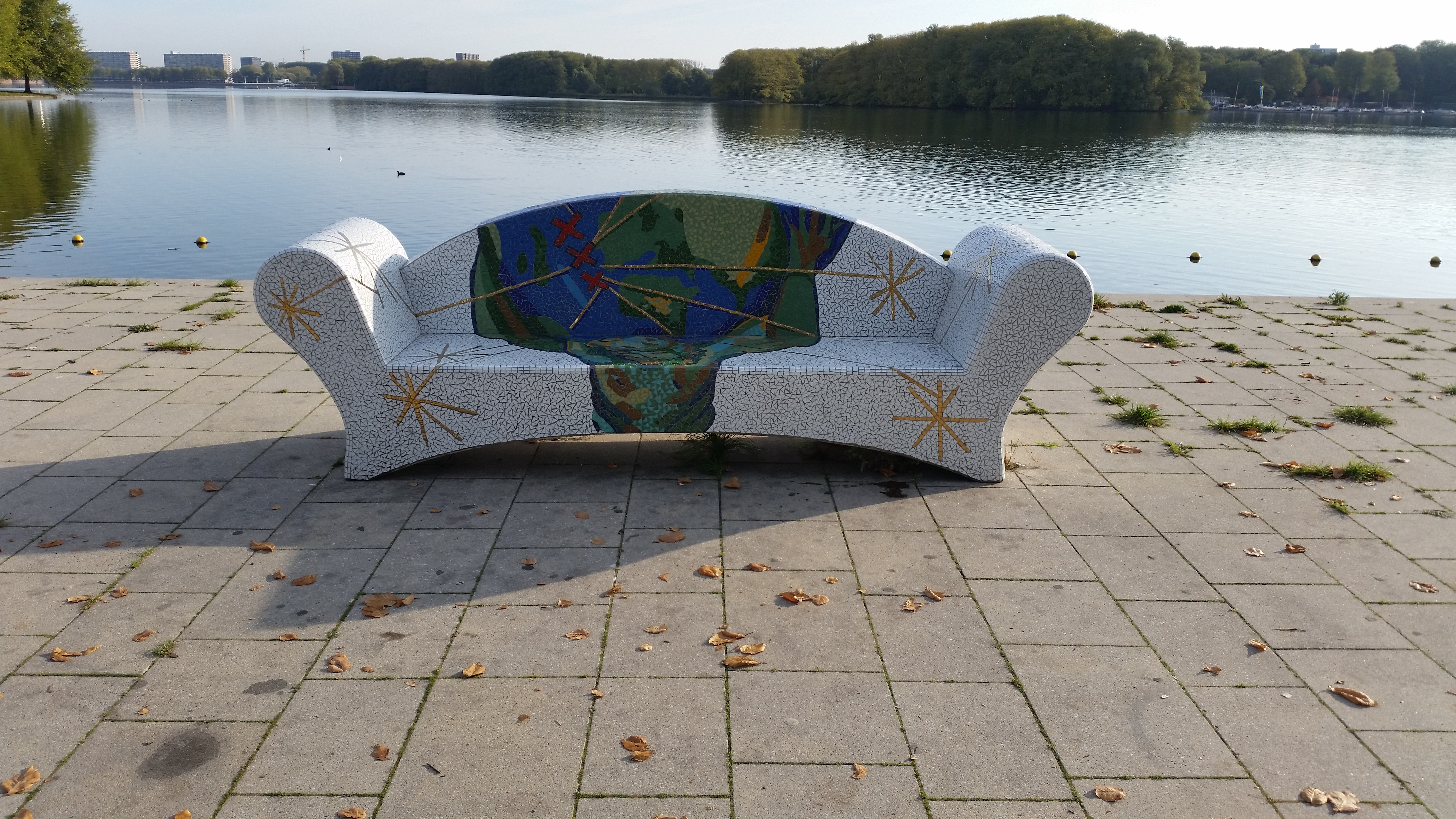 Social sofa, ontwerp van luc4me, uiterlijk ontwerp van Rob van Trier, vervaardigd door Pantar, in 2018 staande tussen Meer en Vaart en de Sloterplas.